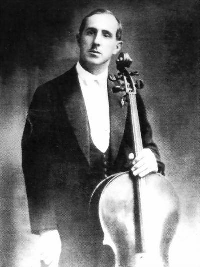 Leopold Rostropoviç